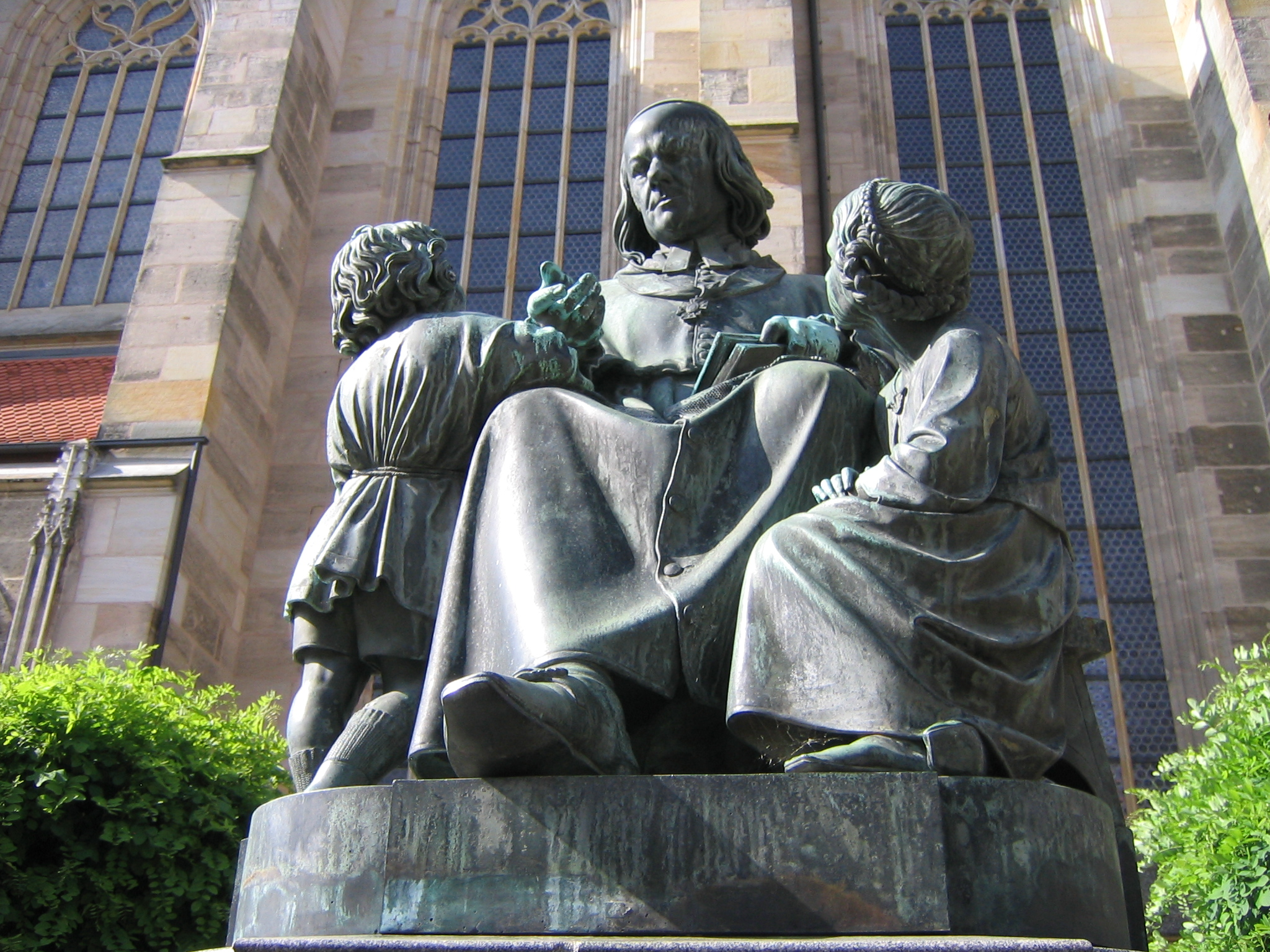 Denkmal für Christoph von Schmid von Max von Widnmann vor dem Dinkelsbühler Münster St. Georg.